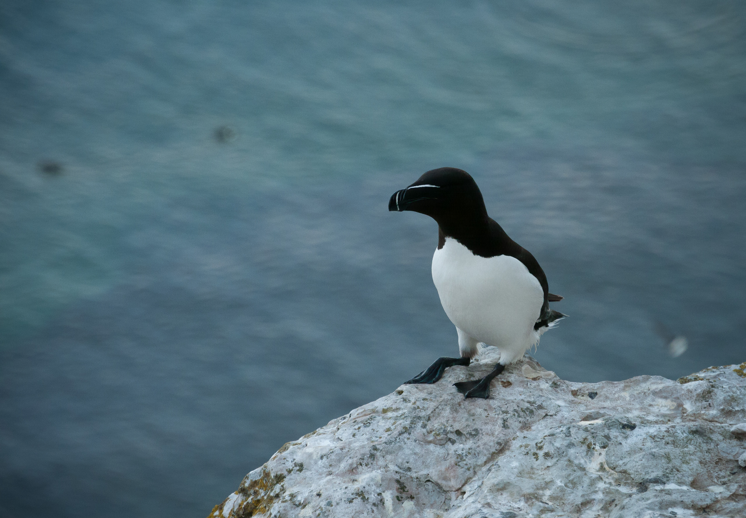 Razorbill